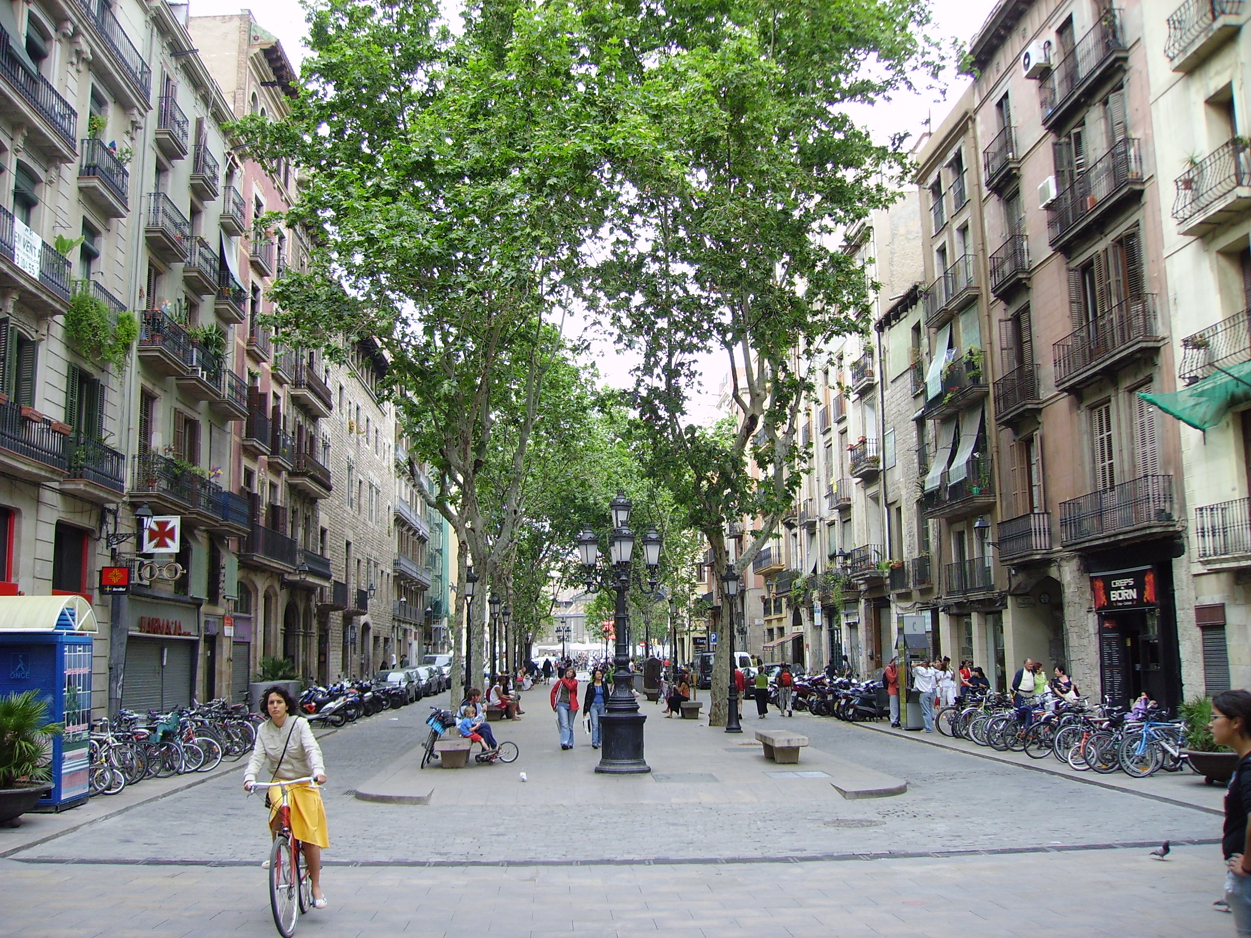 Passeig del Born a Barcelona.